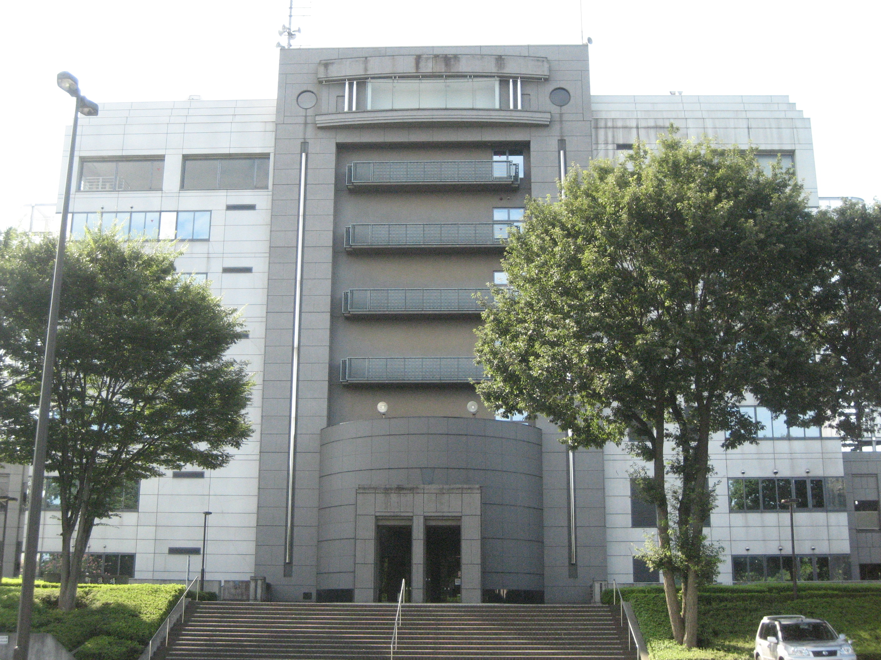 埼玉県三芳町役場